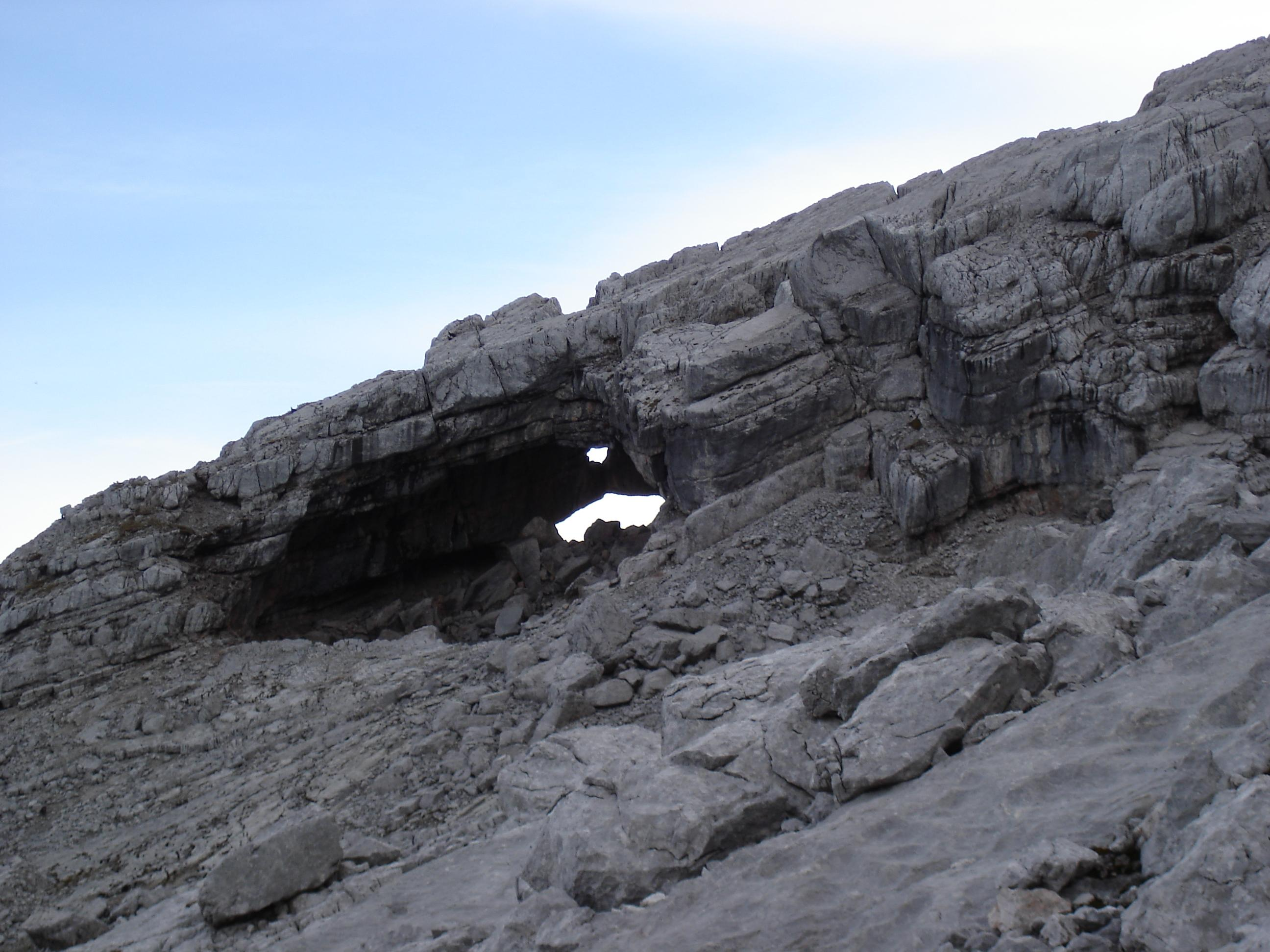 Melkerloch, Leoganger Steinberge, Österreich